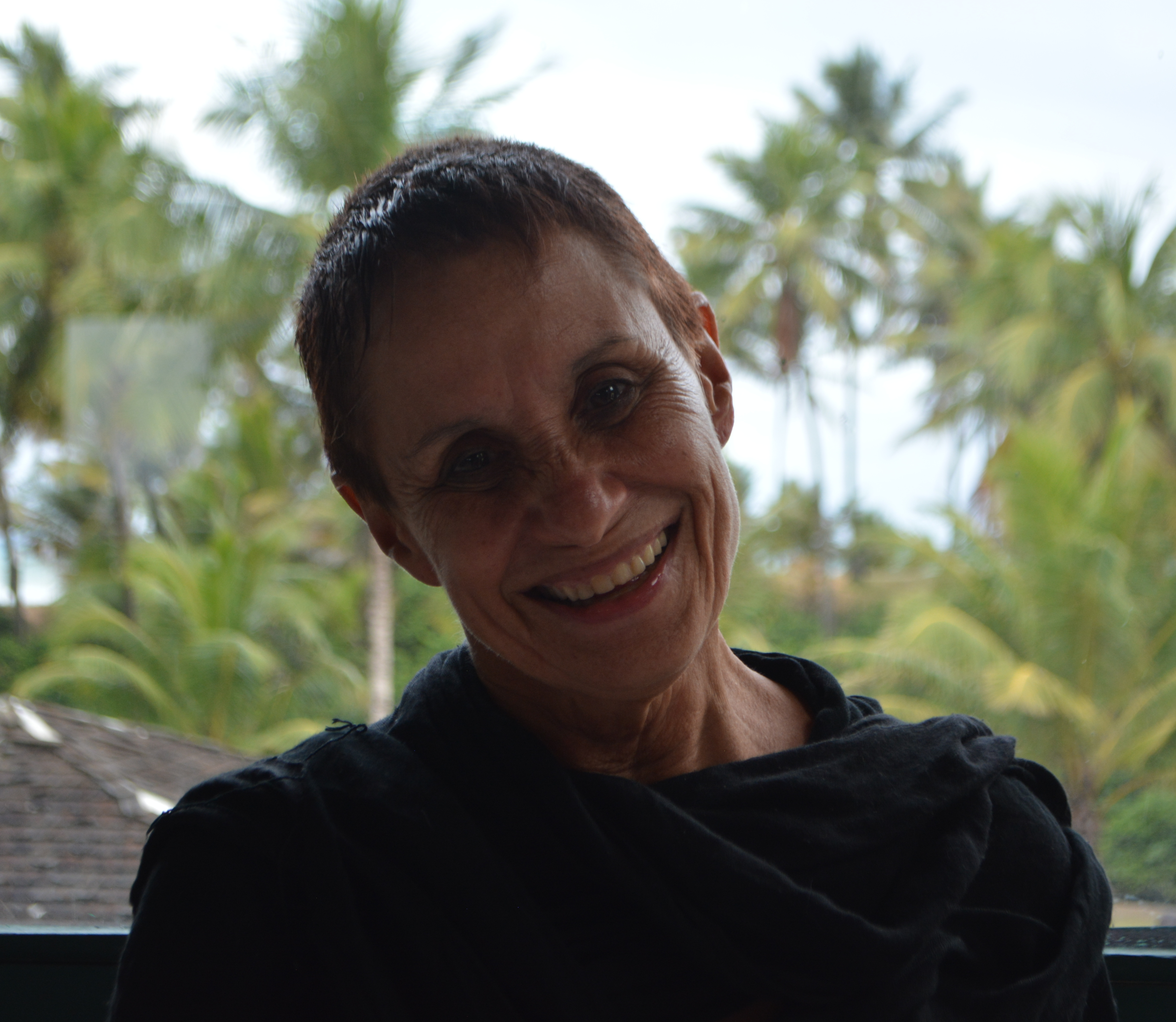 Feminista en AWID 2016